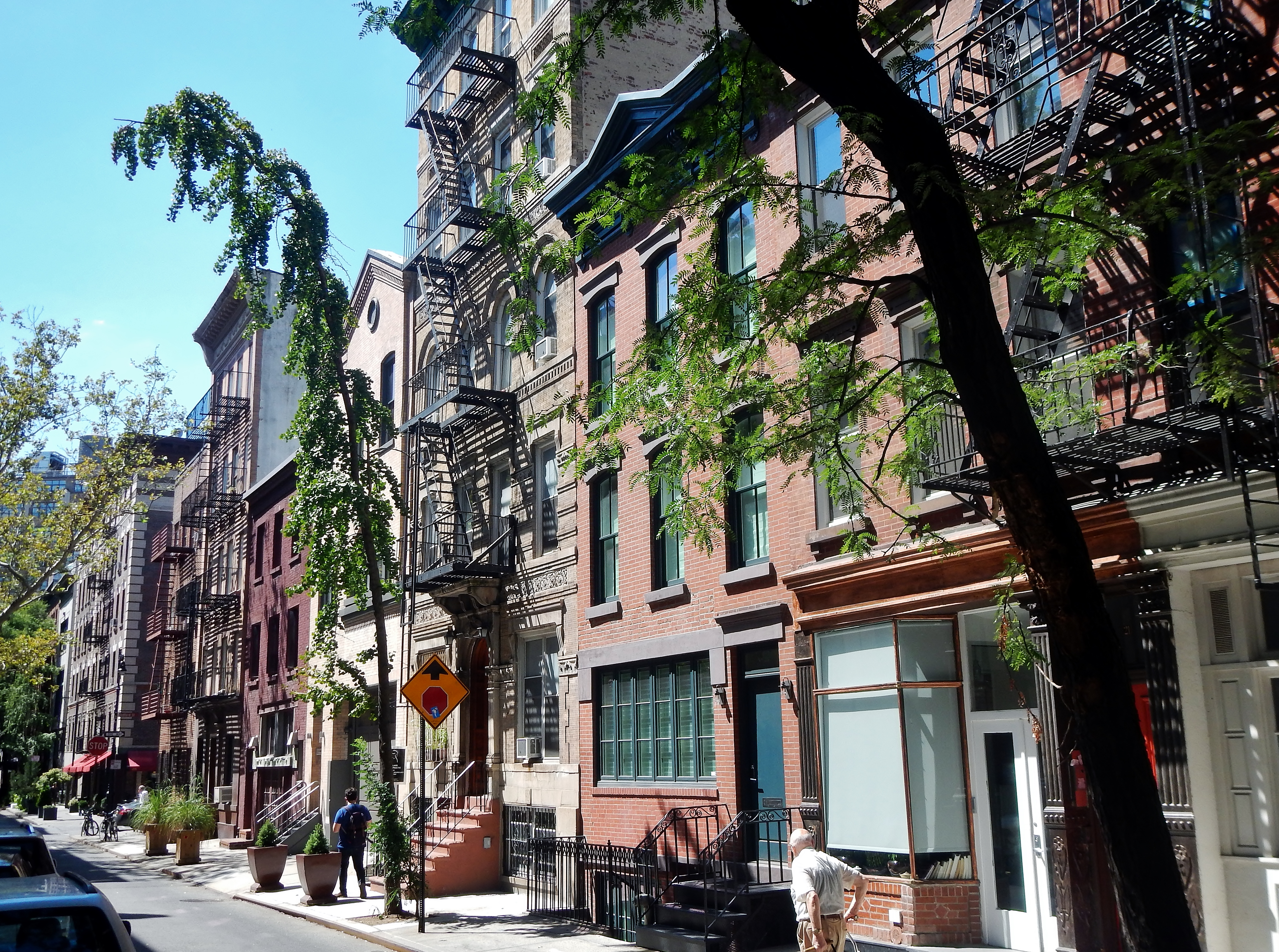 Greenwich Village